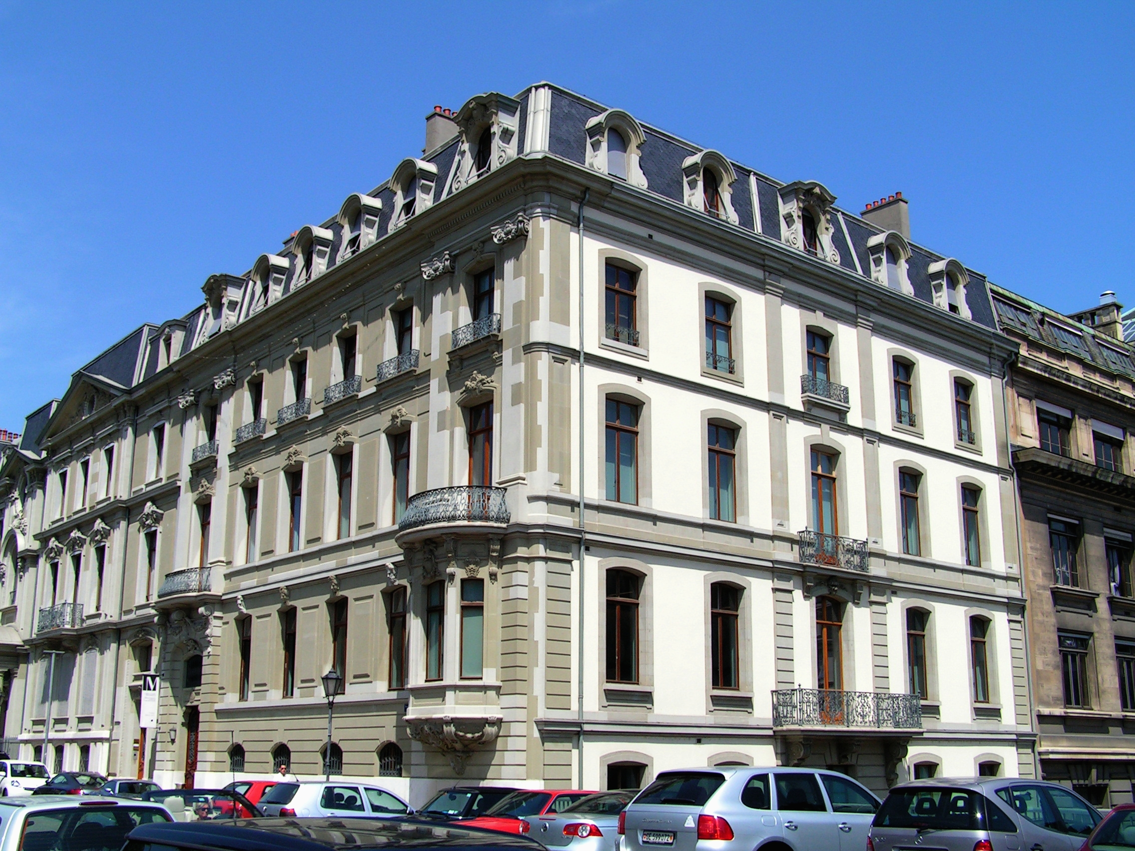 Promenade du Pin 5, Genève. Cabinet des estampes.